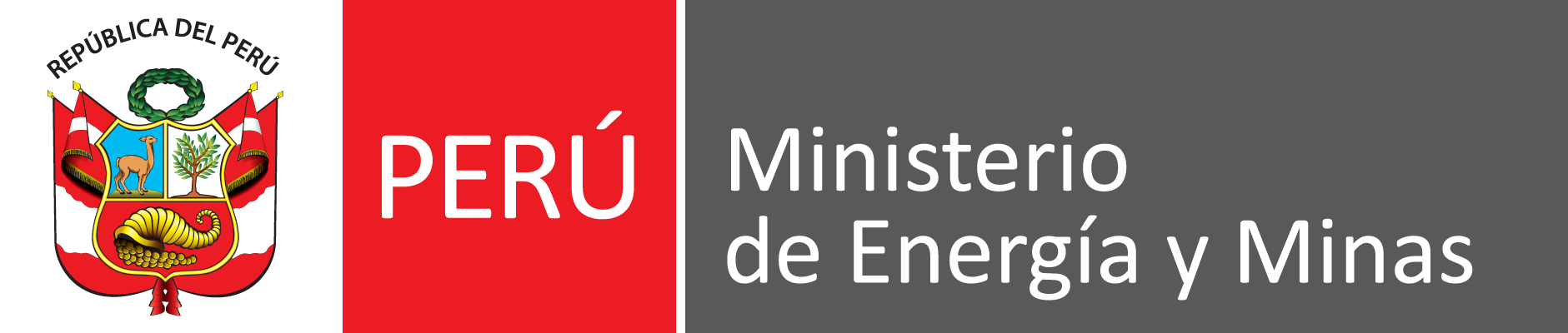 Colección Ministerios de la República del Perú